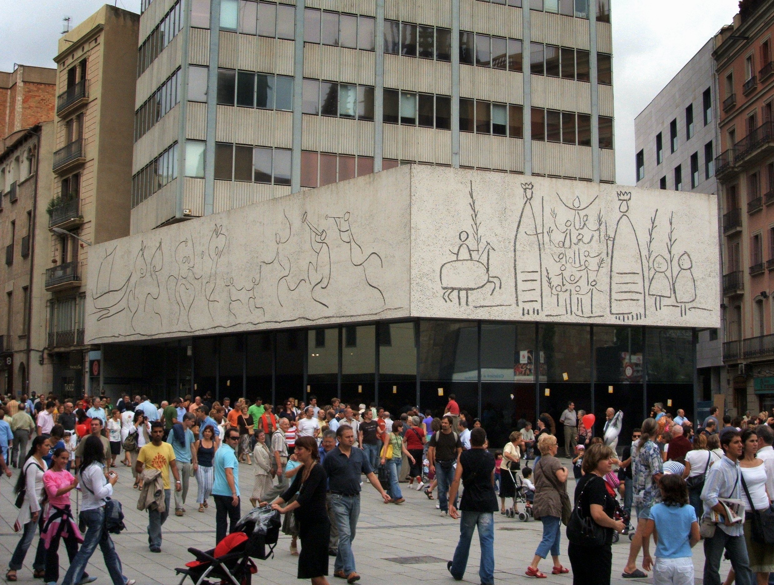 Seu del Col·legi d'Arquitectes de Catalunya, a Barcelona. Façana de Picasso